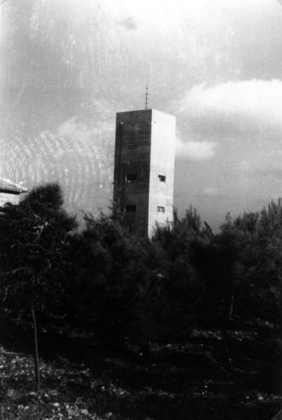 המגדל היווה כל השנים סמל לישוב.בכל צילום הכניסו את אלמנט המגדל שהיה מאוד חשוב לחברים